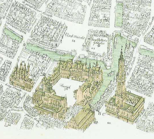 Detail uit de kaart van Brugge van Marcus Gerards